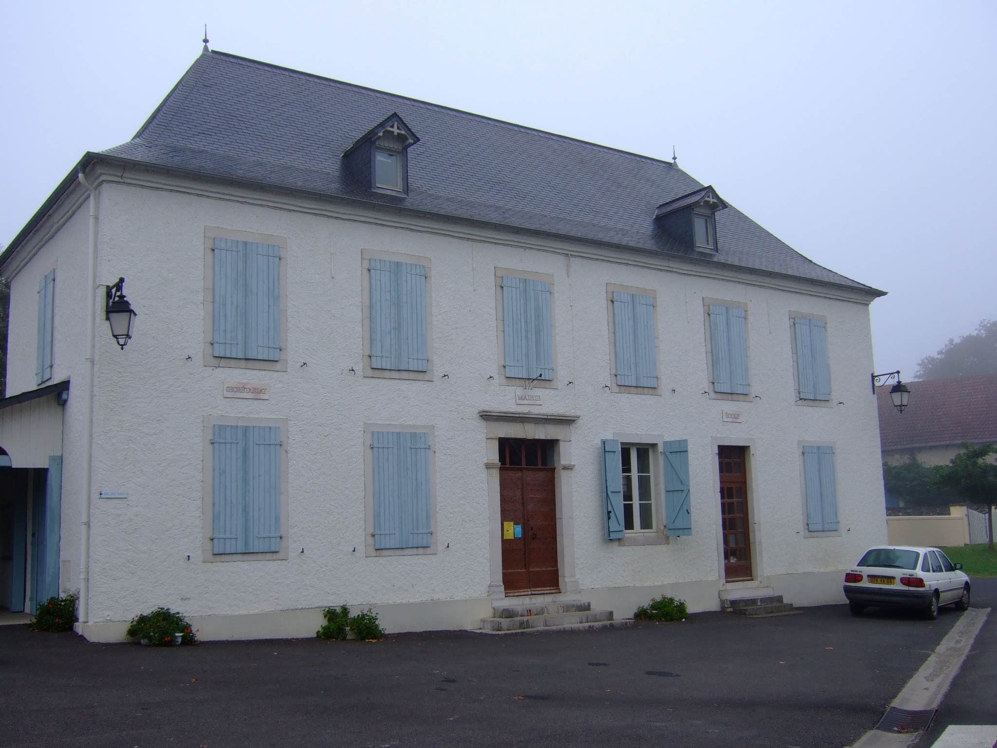 La mairie de Castetnau-Camblong